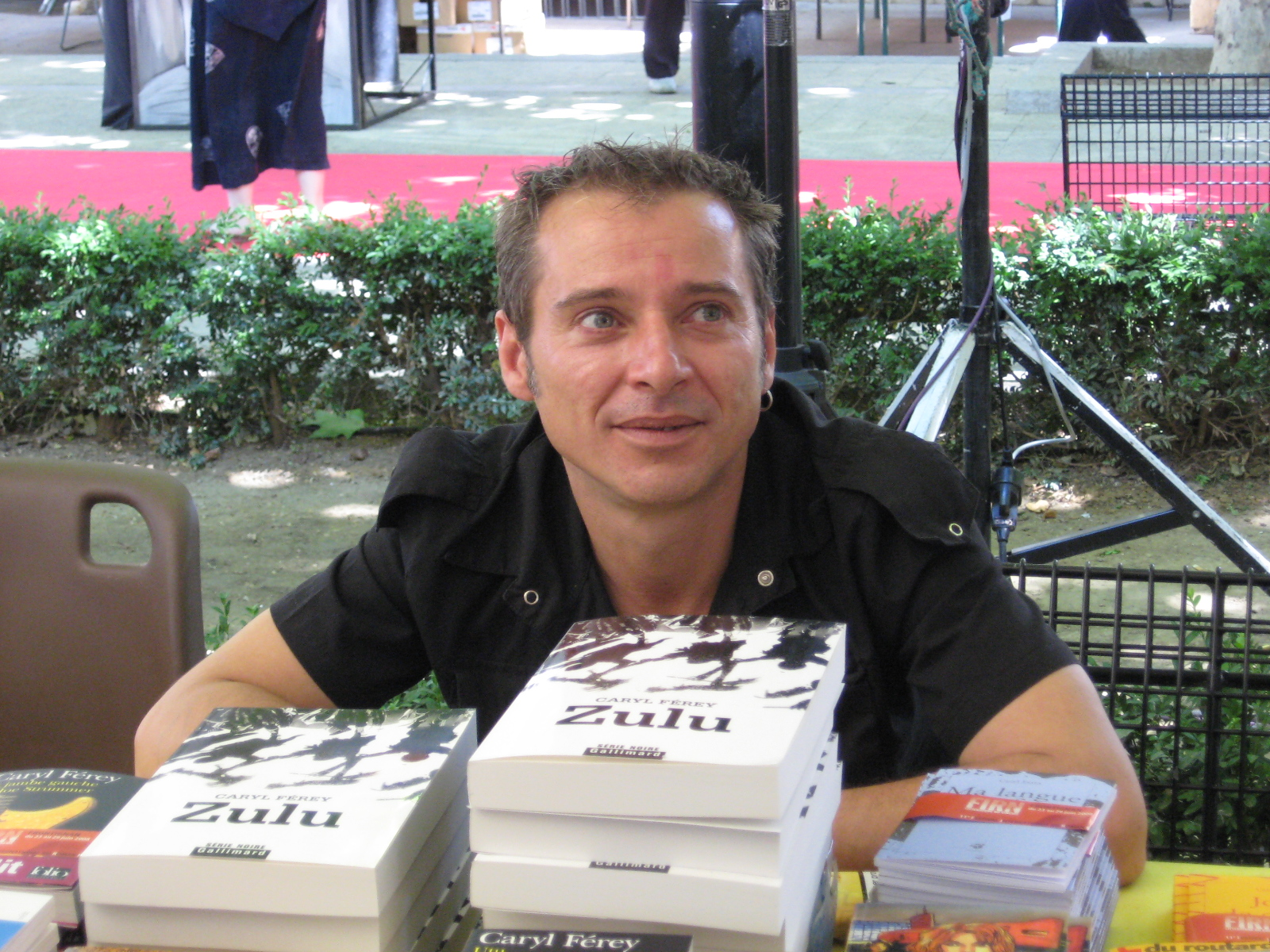 Caryl Férey pris en photo par Jean-Marie David au Festival International du roman Noir de Frontignan (France)